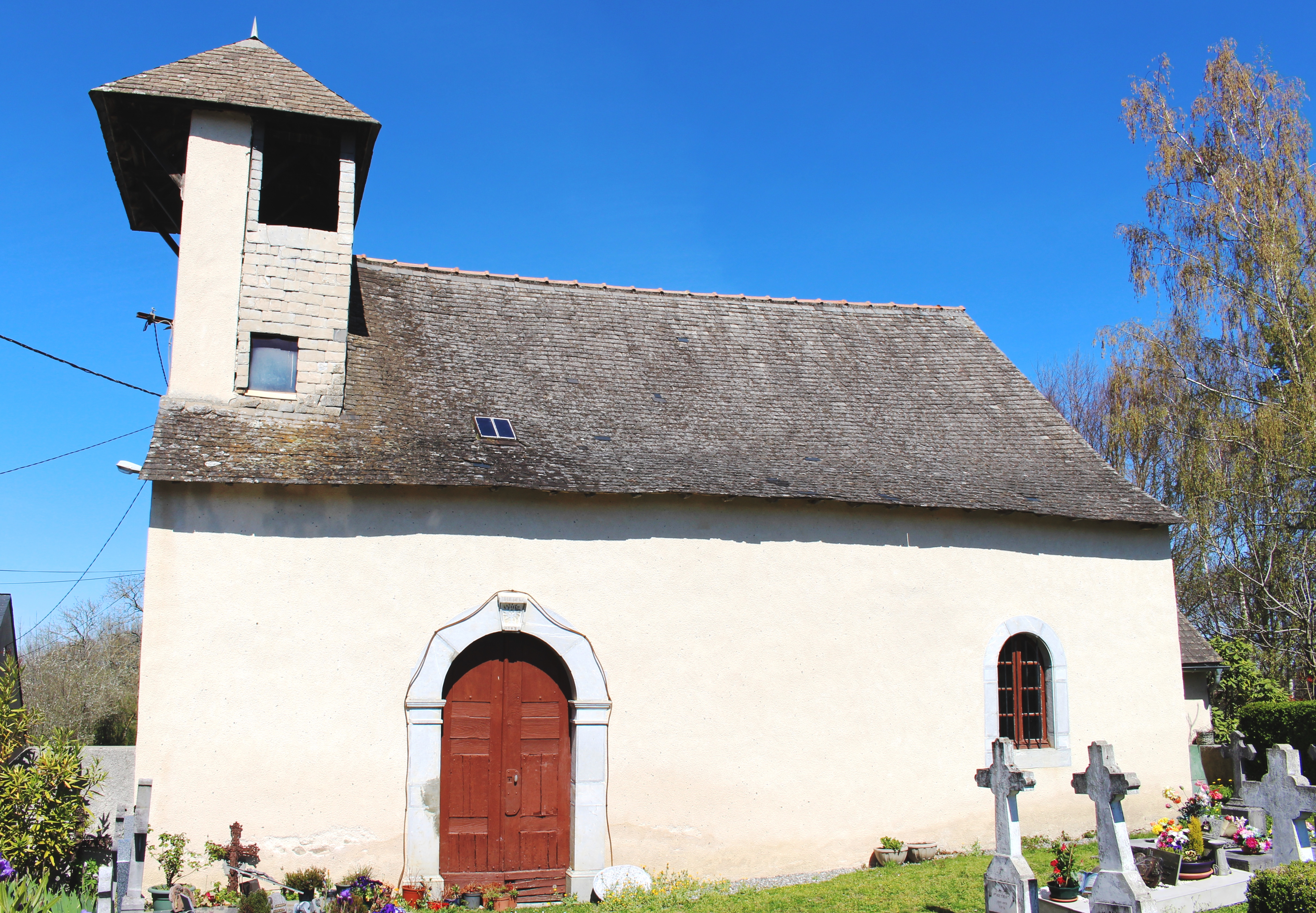 Église Saint-Martin d'Arrayou (Hautes-Pyrénées)